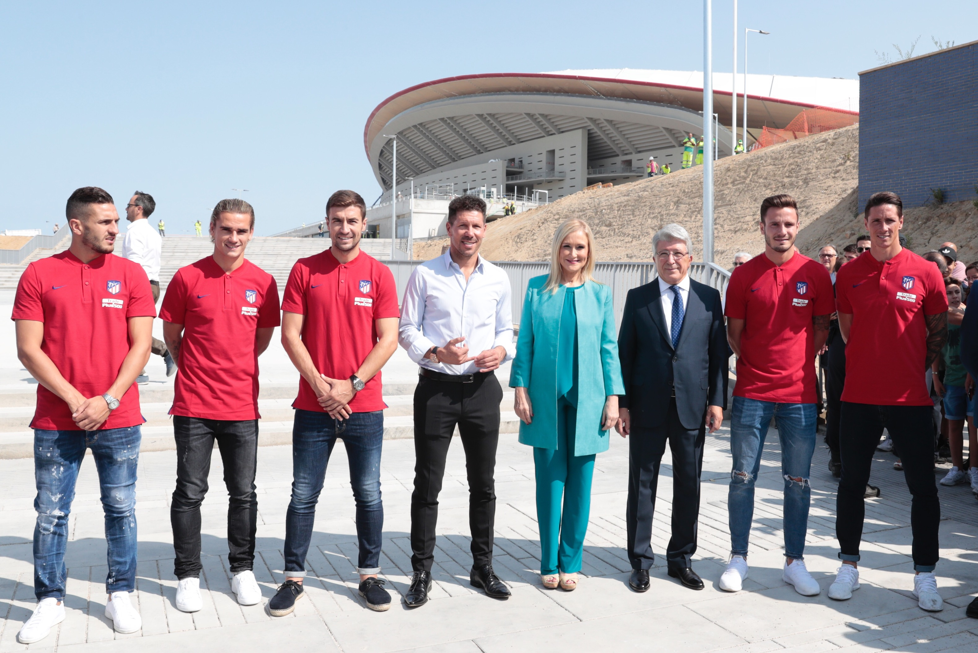 La estación de Estadio Metropolitano está preparada para facilitar el desplazamiento a las miles de personas que asistirán el próximo día 16 al partido inaugural del nuevo feudo rojiblanco. Una estación en la que los seguidores del Atlético de Madrid se encontrarán como en su casa y podrán observar cómo la historia de Metro está ligada a la de los estadios de su equipo, admirar los diferentes escudos que ha lucido el Atlético de Madrid y disfrutar con la iluminación de los colores rojiblancos. ¡Aúpa Atleti!